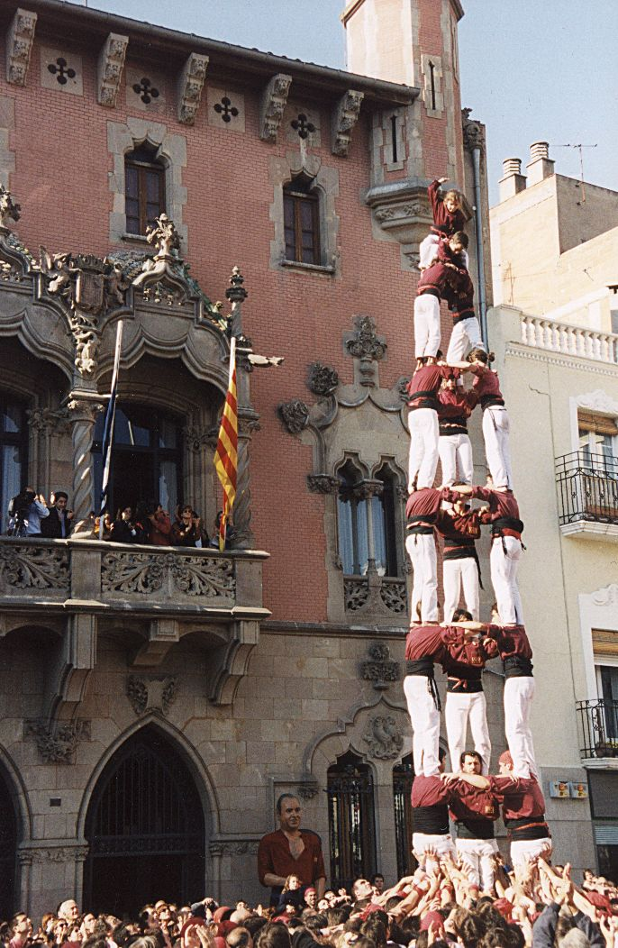 Primer 3 de 8 descarregat pels Xics de Granollers (Granollers, 08/11/1998)